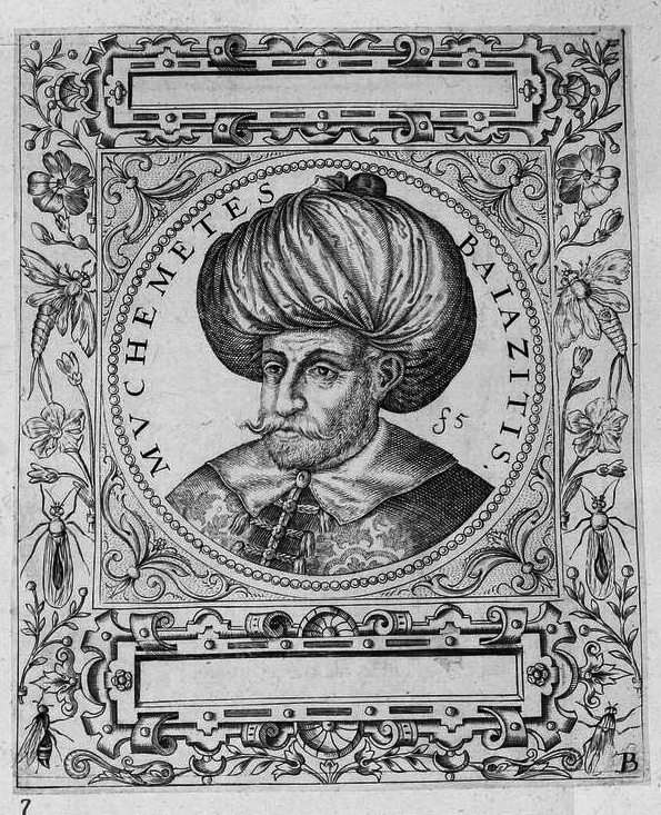 Grafik aus dem Klebeband Nr. 1 der Fürstlich Waldeckschen Hofbibliothek Arolsen Illustration aus: Georg Greblinger: Wahre Abbildungen der Türckischen Kayser vnd Persischen Fürsten / so wol auch anderer Helden und Heldinnen von dem Osman / biß auf den andern Mahomet. Johann Ammon, Frankfurt 1648 Motiv: "Muchemetes Baiazitis"